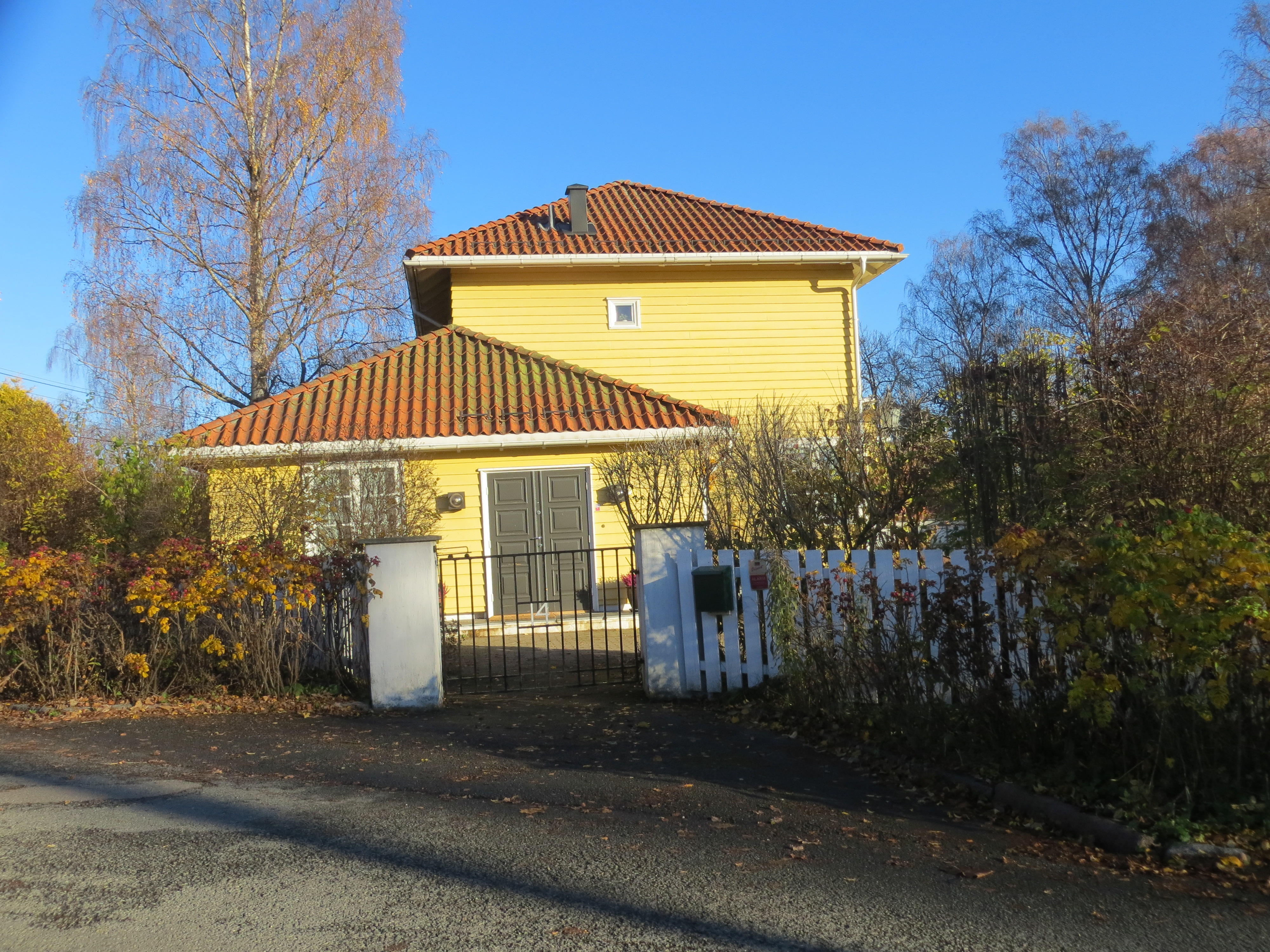 Klassisk villabebyggelse med bygningsvern i Bernard Herres vei, Smestad (Oslo)